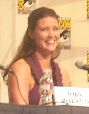 Sarah Lancaster